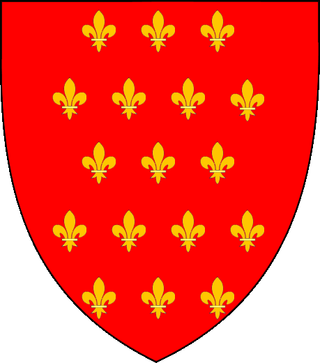 Blasón de la Casa Consolo. 17 Floores de lis de oro sobre campo de gules.